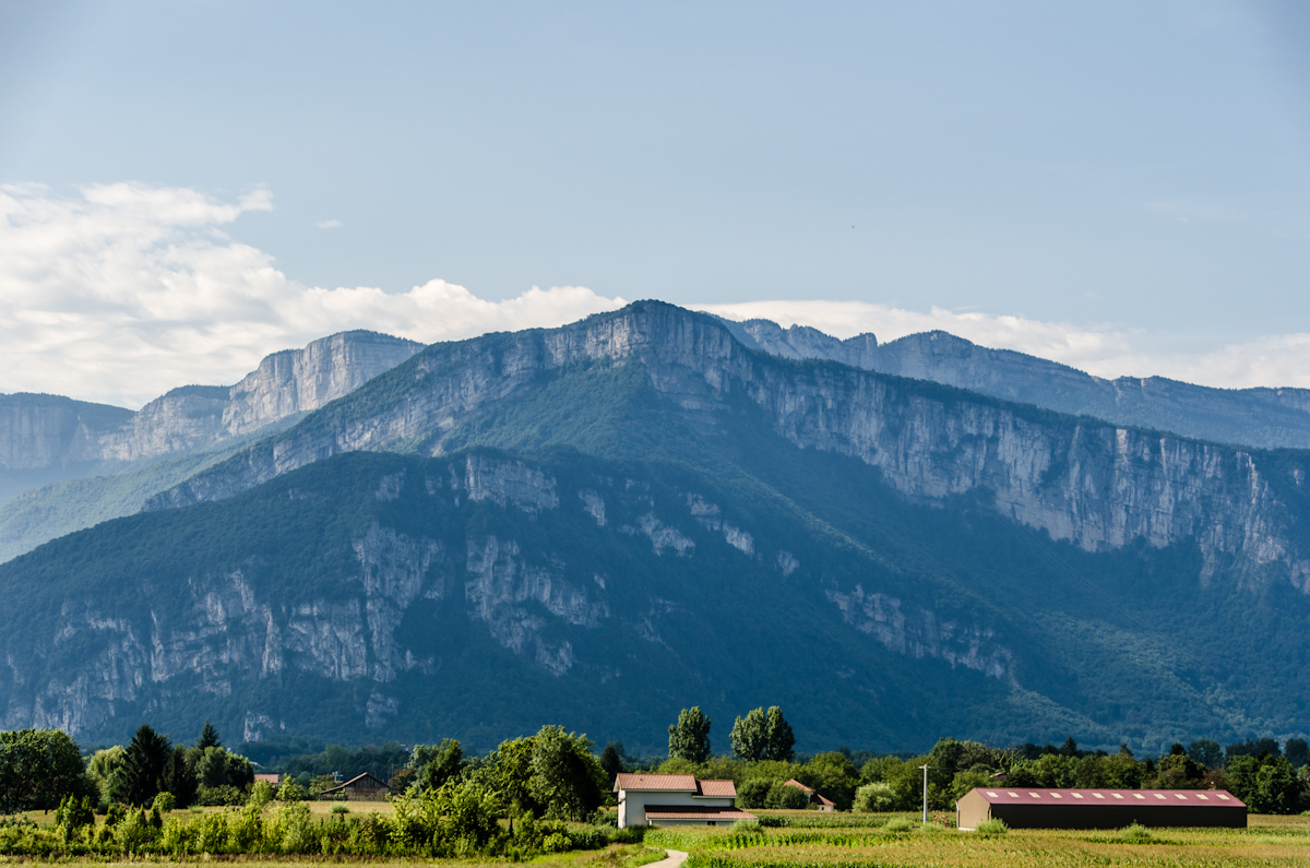 La Dent de Moirans (Isère) - photo prise du Pansu à La Buisse